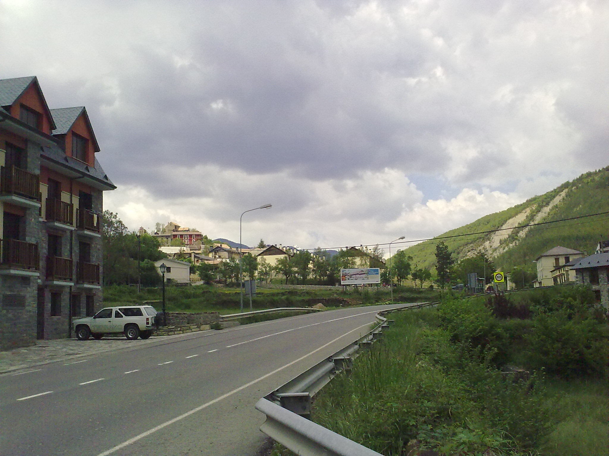 Castiello de Jaca (Jacetania, Aragon, Espagne) - La rue principale.